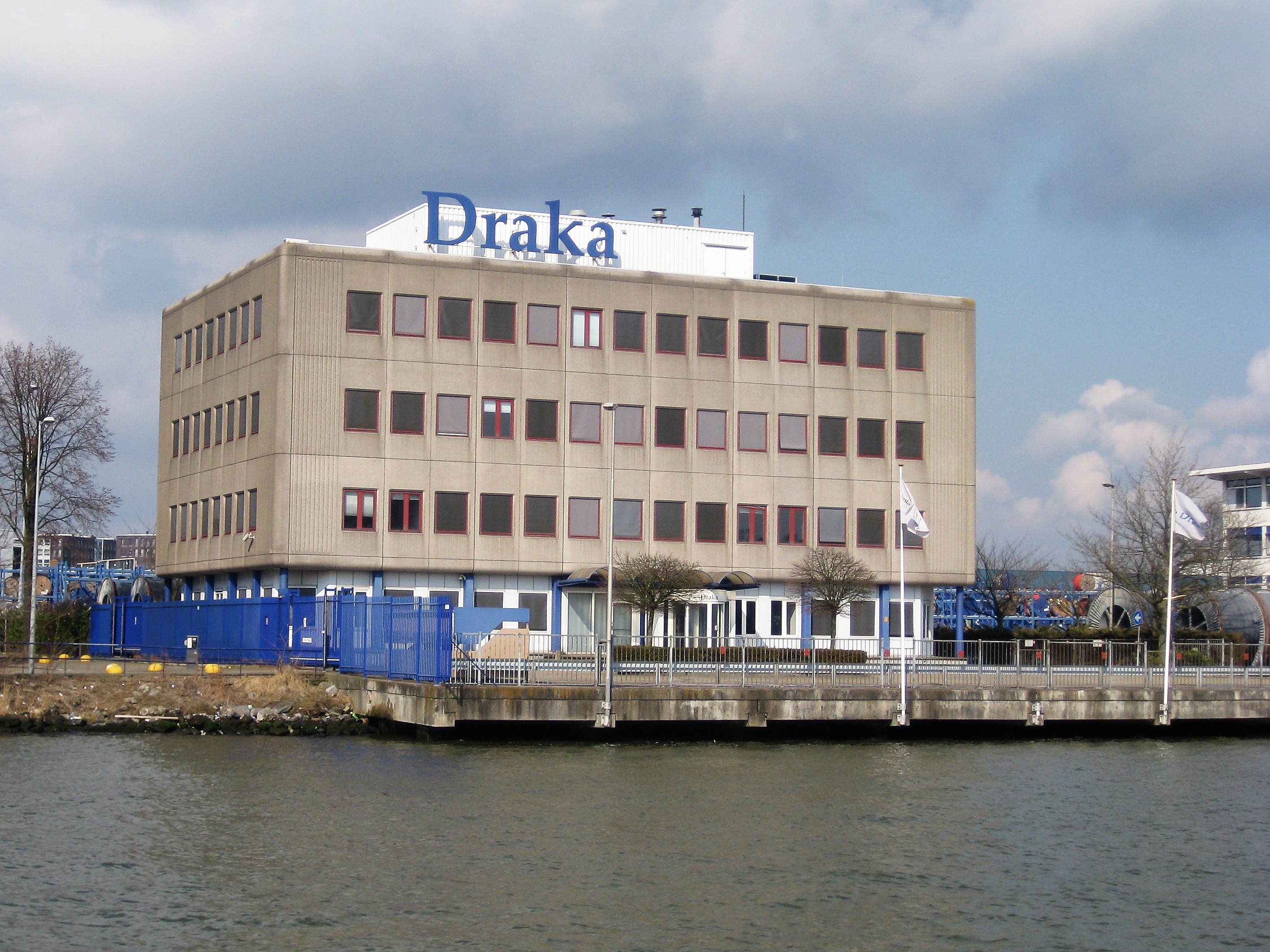 Draka kabelfabriek in Amsterdam-Noord